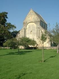 Chapelle du Prieuré Saint Gabriel vue de l'extérieur à Saint-Gabriel-Brécy dans le Calvados